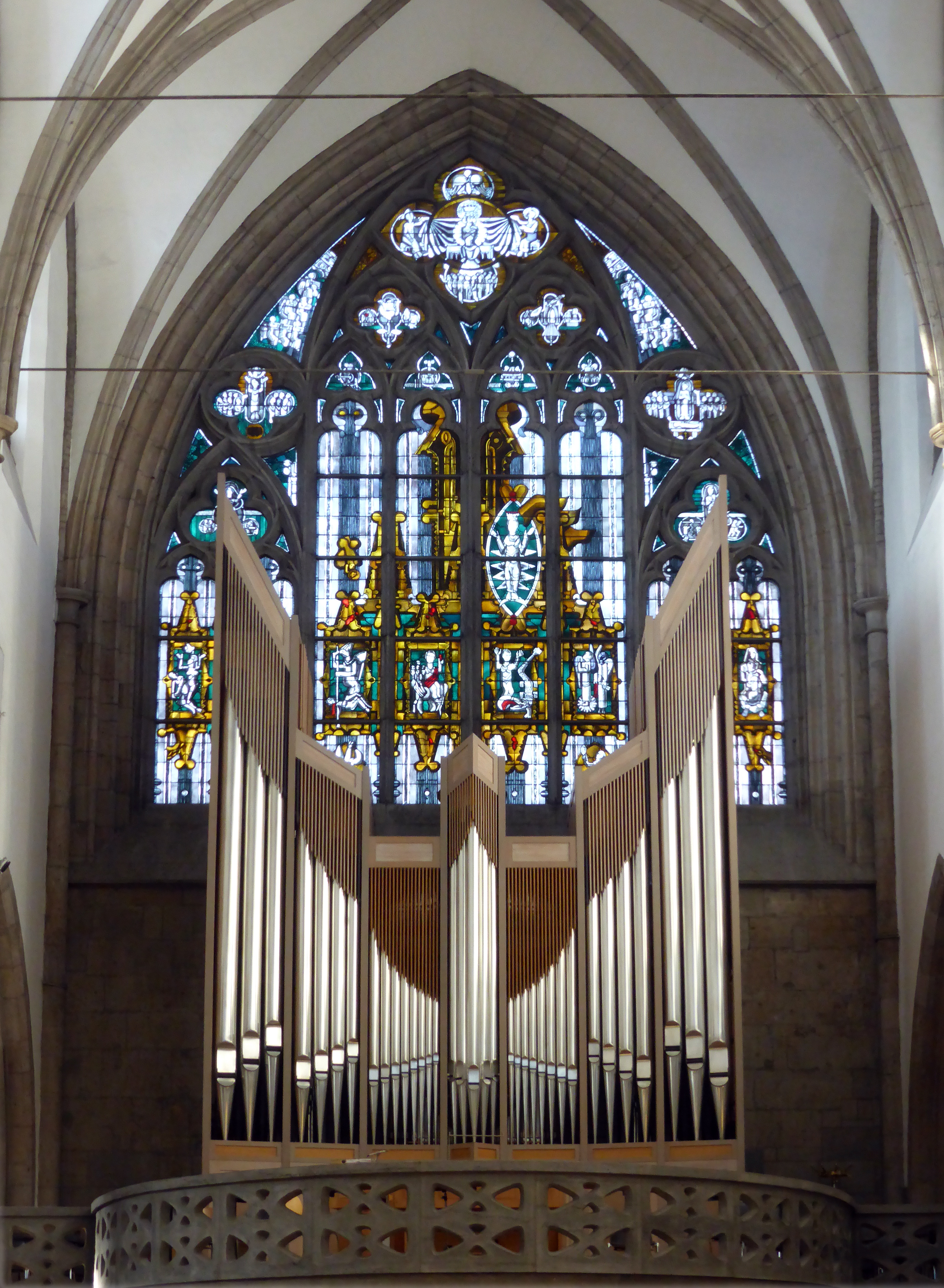 Minoritenkirche (Köln) - Orgel der Firma Orgelbau Romanus Seifert & Sohn, Kevelaer. This is a photograph of an architectural monument.